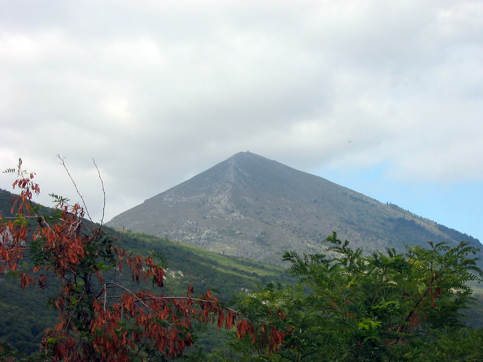 Српски (ћирилица): Строги природни резерват Ртањ, врх Шиљак